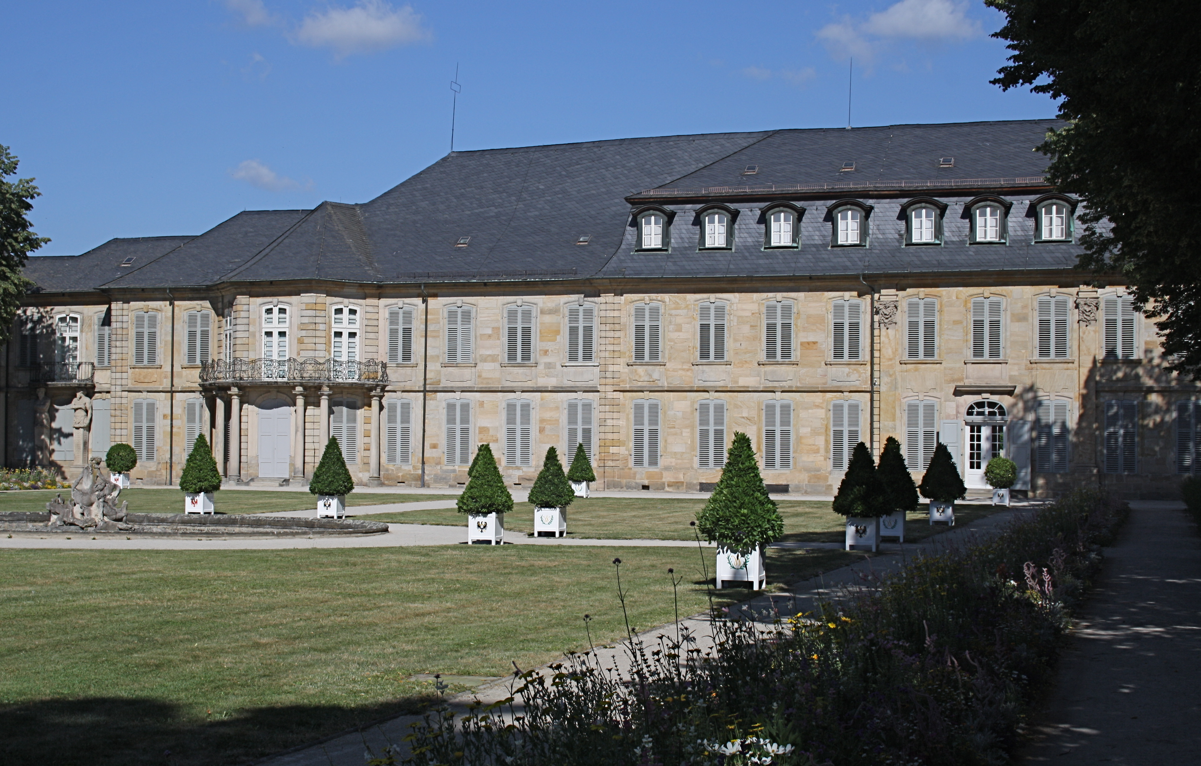 Neues Schloss Bayreuth, Südflügel